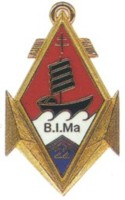 insigne régimentaire du 22e bataillon d'Infanterie de Marine